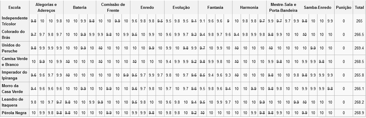 Resultados do Carnaval de São Paulo - 2015 - Acesso